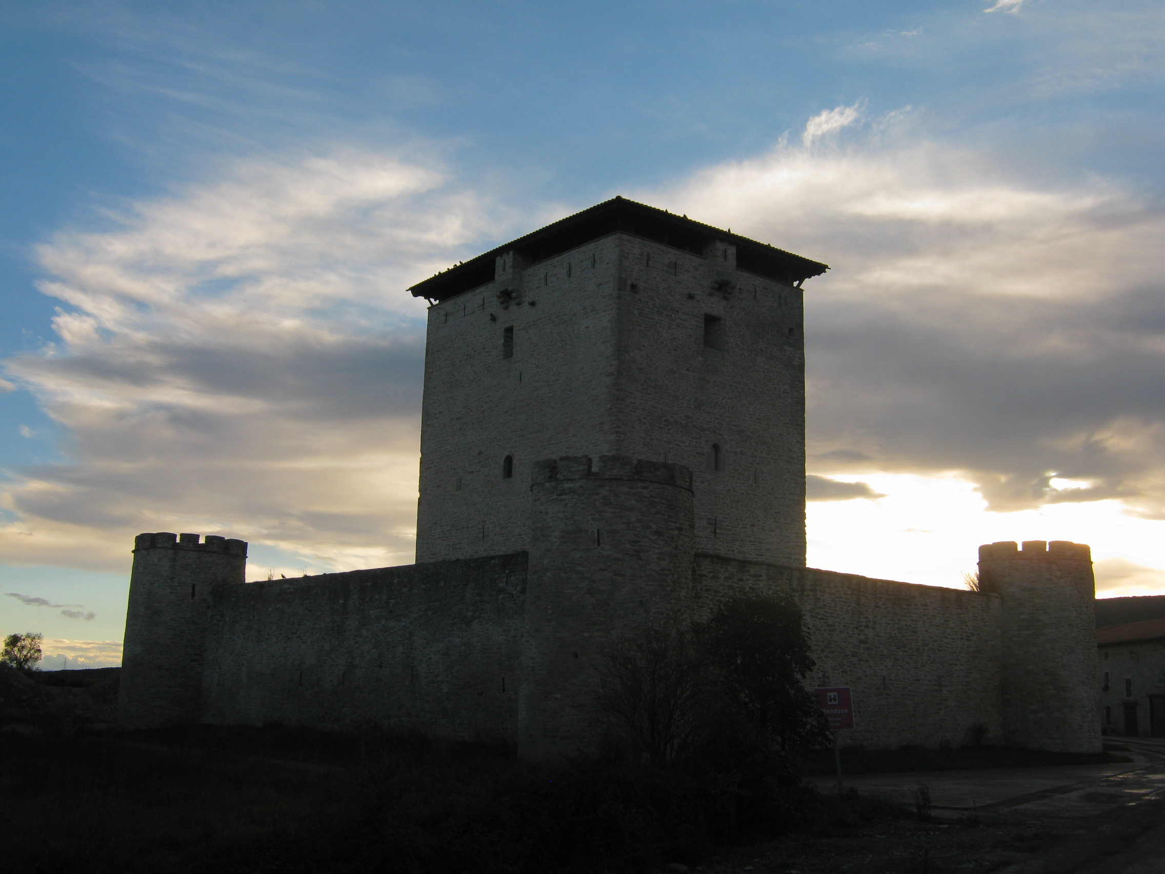 Castillo de Mendoza (Álava, España)